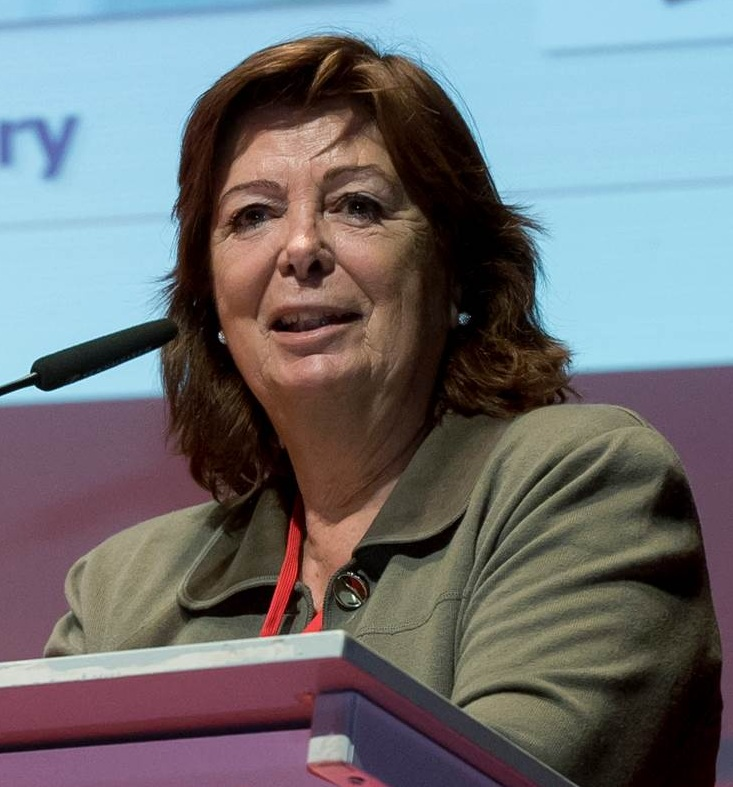 Fotografía de María Vallet Regí realizando una conferencia en un congreso de Química.